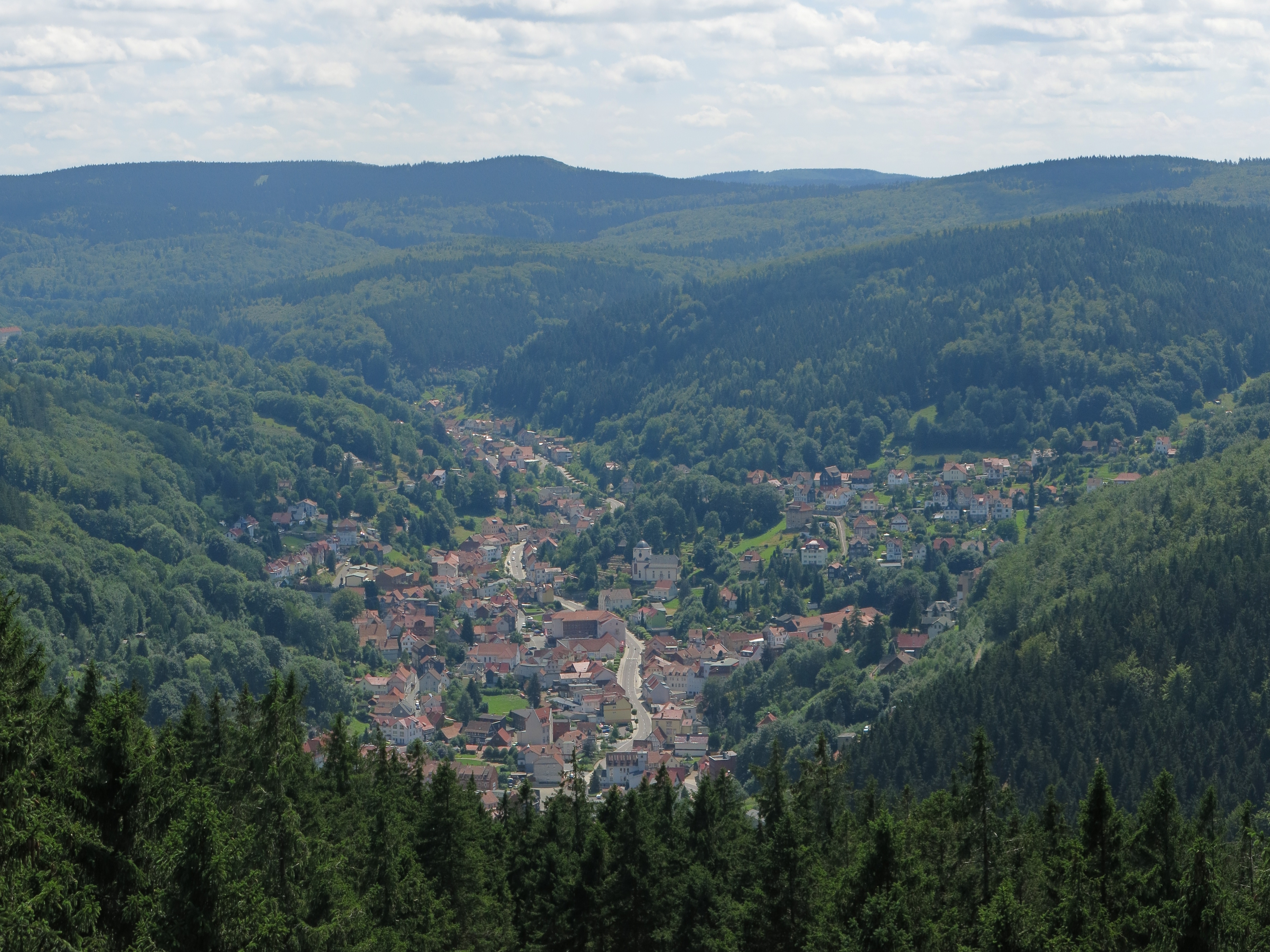 Blick vom Carl-Alexander-Turm auf dem Ringberg auf Ruhla.